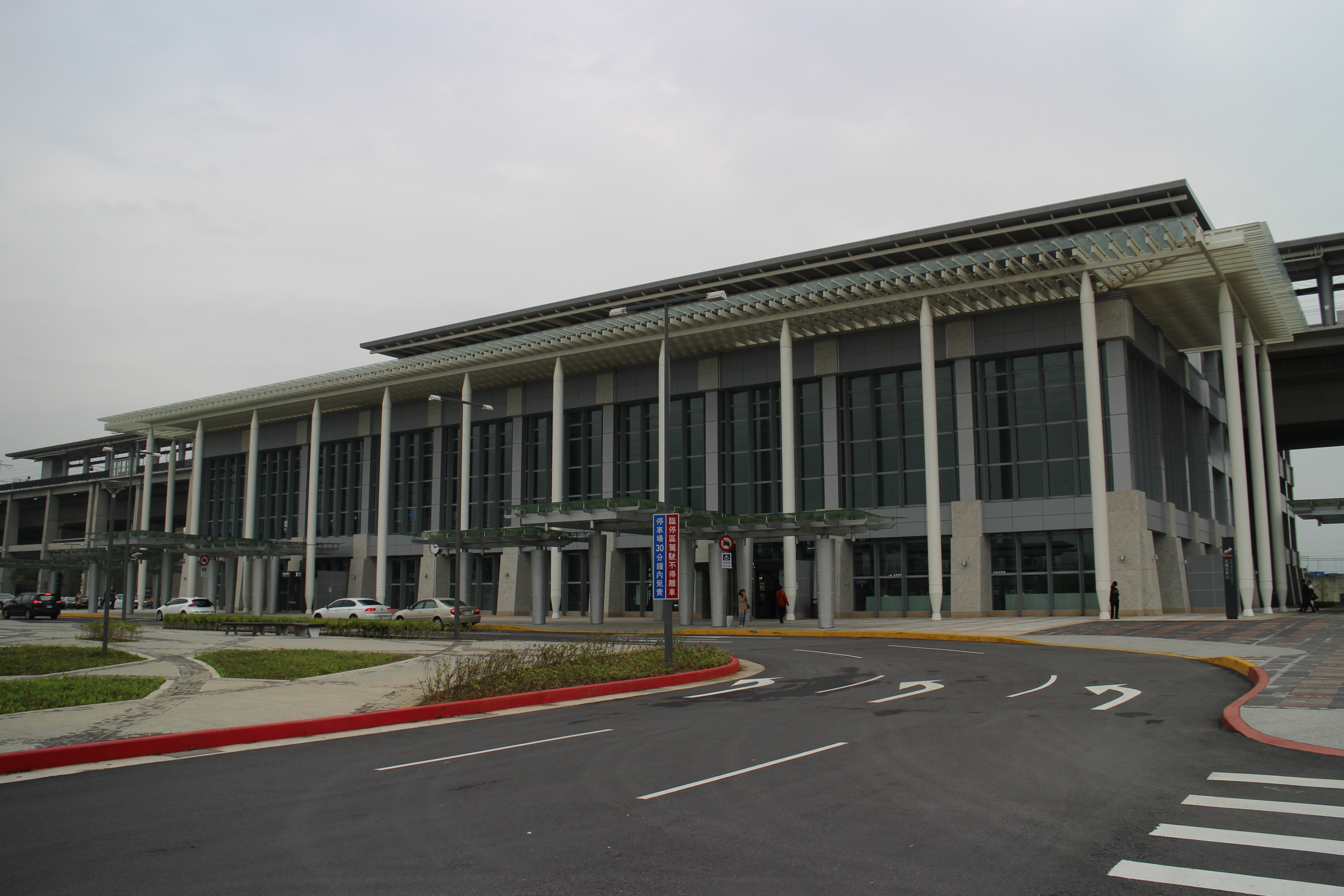 台湾高速鉄道苗栗駅